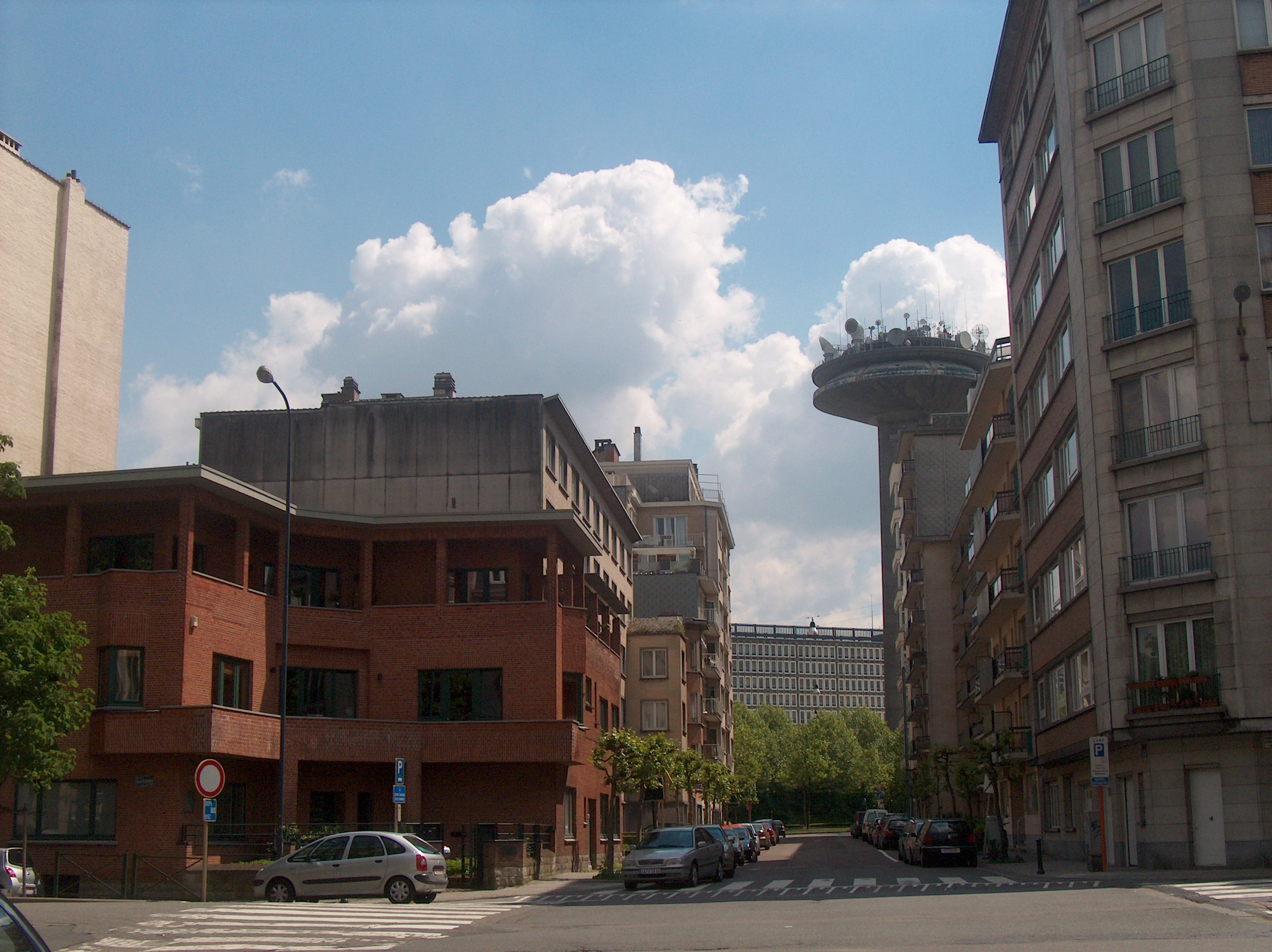 La rue du Saphir à Schaerbeek, Bruxelles, Belgique.